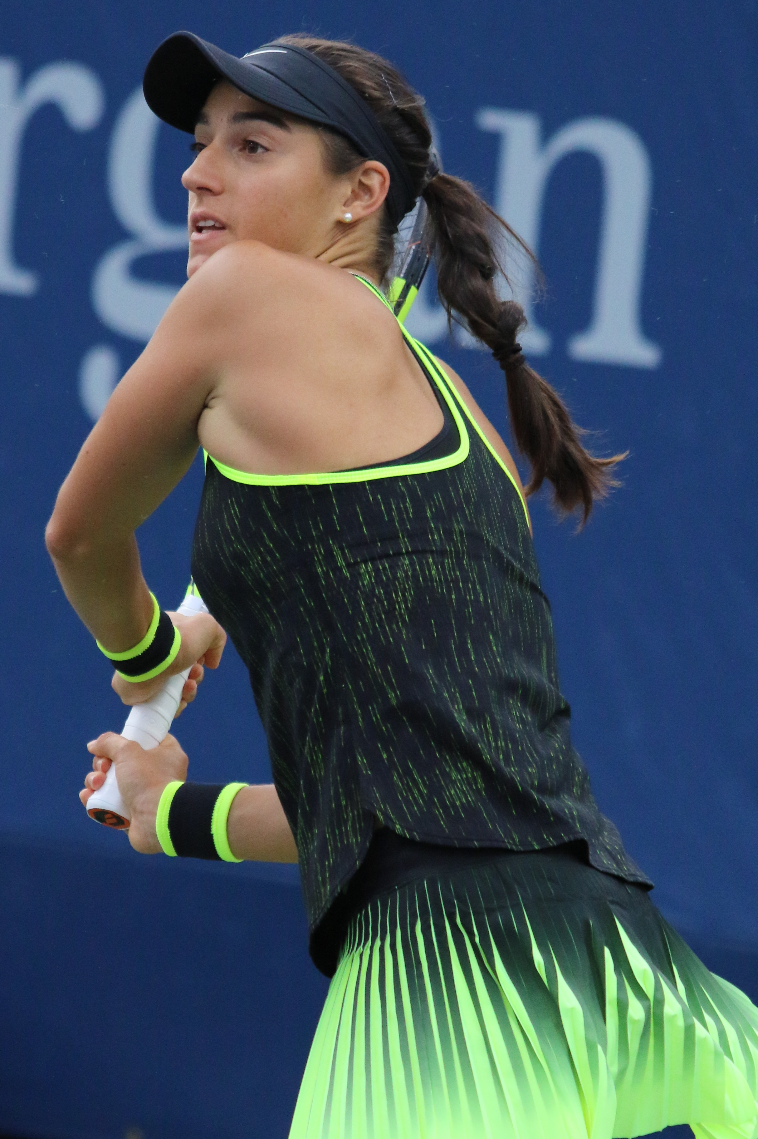 Garcia US16 (30)